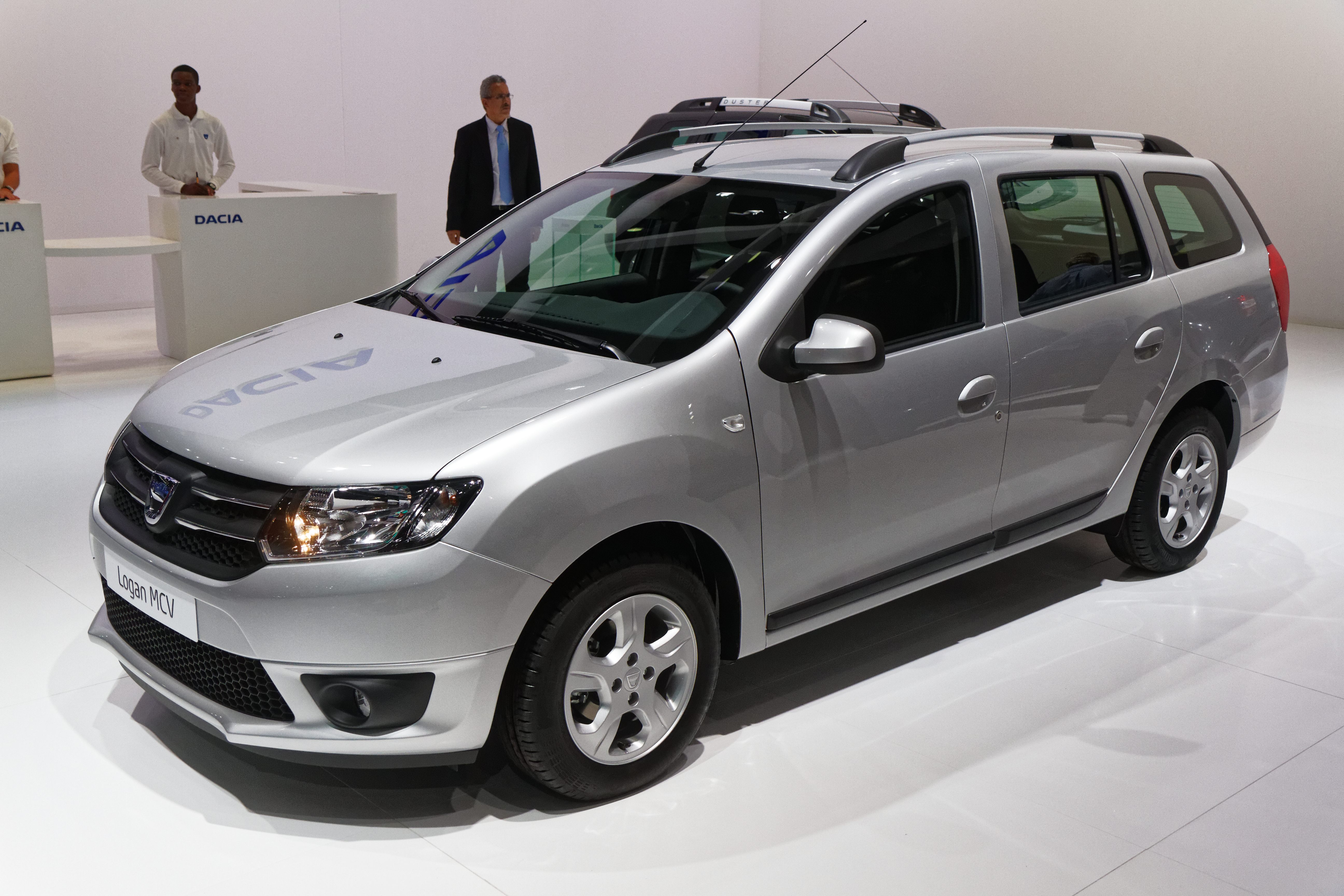 Une Dacia Logan MCV présentée lors du mondial de l'automobile de Paris 2014.